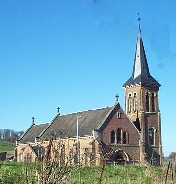 Photo de l'église de Hodeng au bosc prise en 2002 Utilisateur:Neven